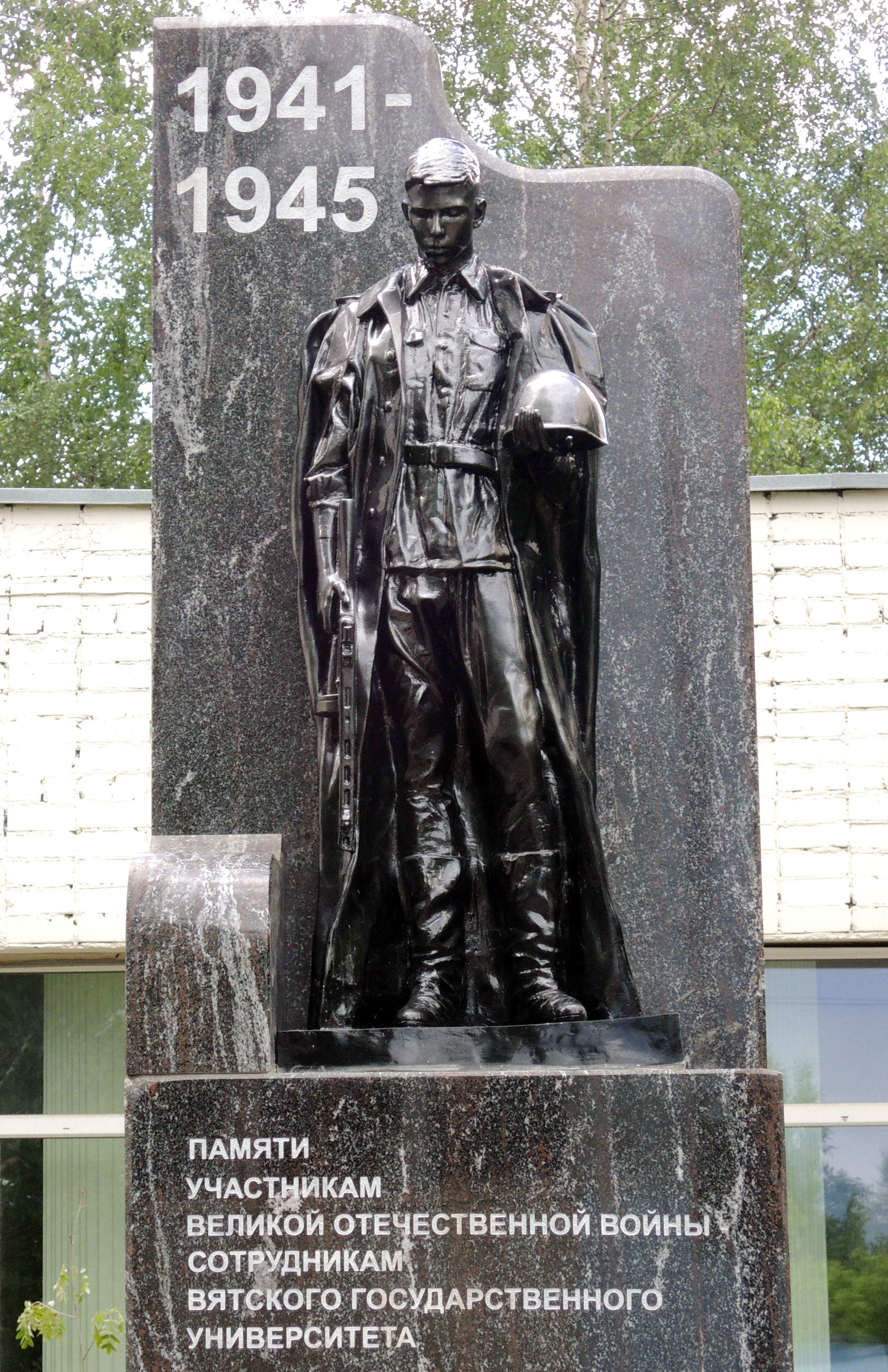 Автор Максим Наумов